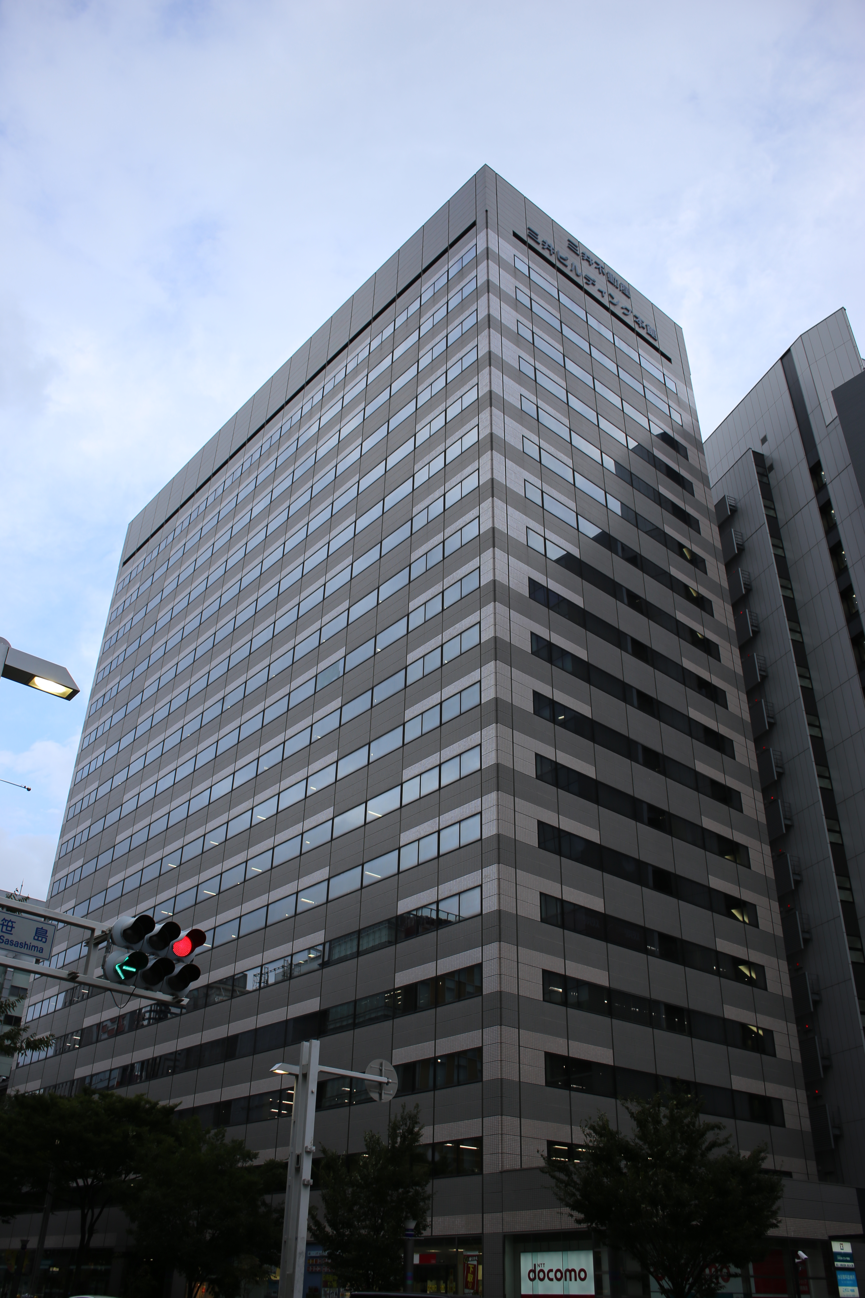 名古屋市中村区名駅南一丁目の名古屋三井ビル本館を北側公道西側より撮影